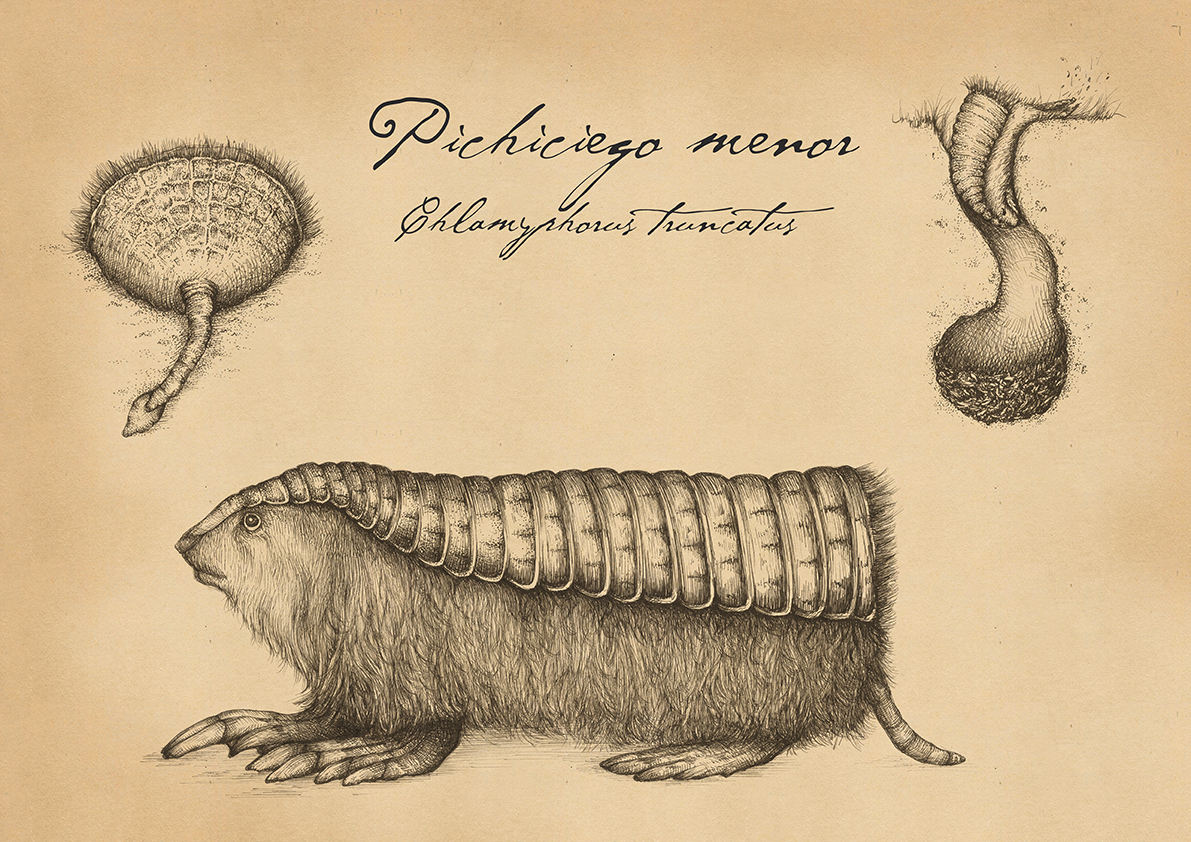 El pichiciego menor o pichiciego pampeano (Chlamyphorus truncatus) es una especie de mamífero cingulado de la familia Dasypodidae. Es el más pequeño de los armadillos de un pálido color rosado. Habita en la región central de Argentina donde encuentra pastos duros, en planicies arenosas con arbustos y cactus. Es un animal nocturno. Excava sus madrigueras en la tierra, generalmente cerca de hormigueros. Se alimenta principalmente de hormigas y sus larvas, y a veces también de gusanos, caracoles, otros insectos y sus larvas, y varias plantas y raíces. Cuando se siente amenazado, cava en la tierra a gran velocidad hasta enterrarse por completo. Desde 1970 el pichiciego menor está en la lista de especies en riesgo de extinción. Su principal problema es la destrucción de su hábitat por el avance de los cultivos. Por esta razón, y por sus hábitos nocturnos, los animales son raros de ver. No hay esfuerzos serios por preservar la especie.